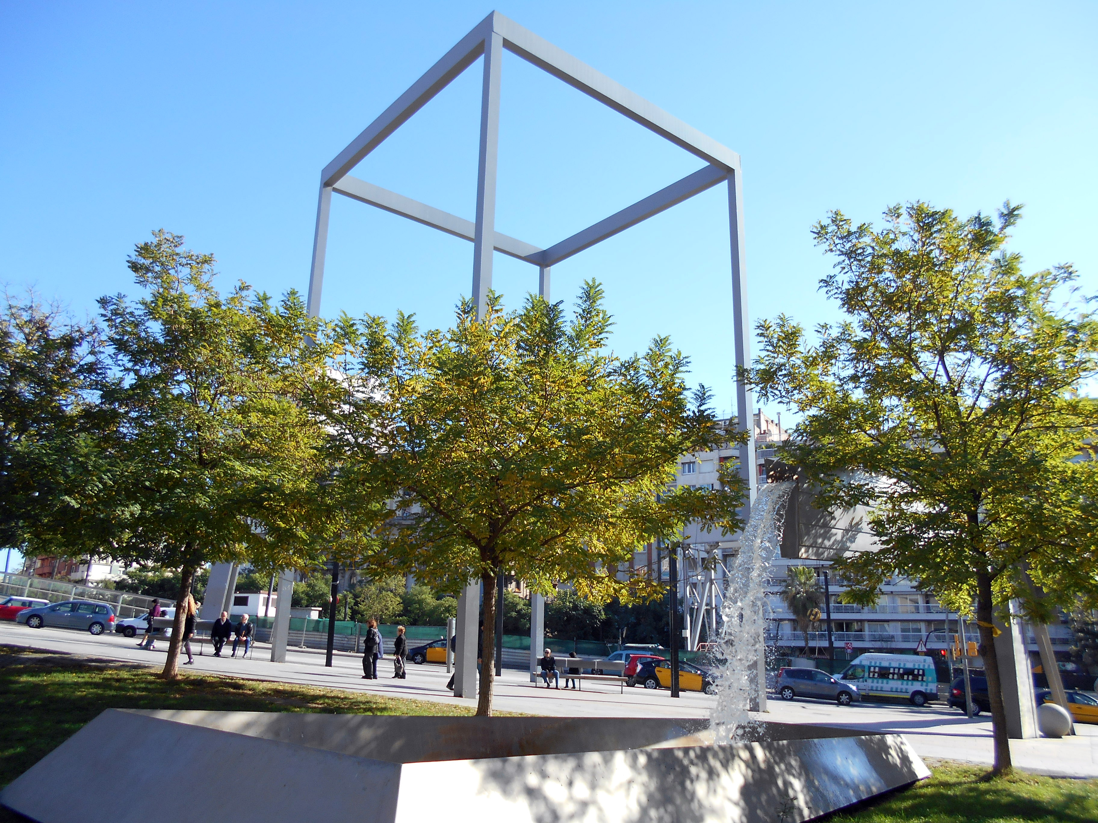 Canal de Suez, plaza de Lesseps.